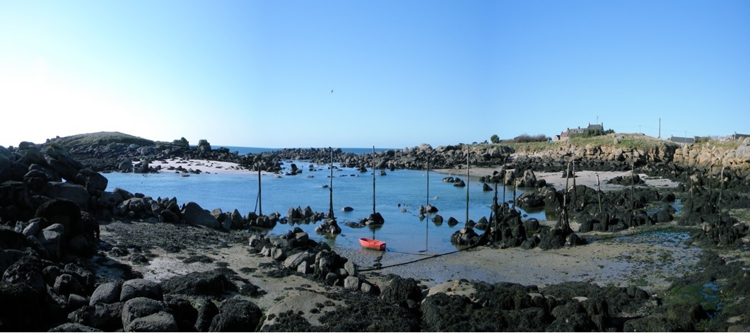 hh